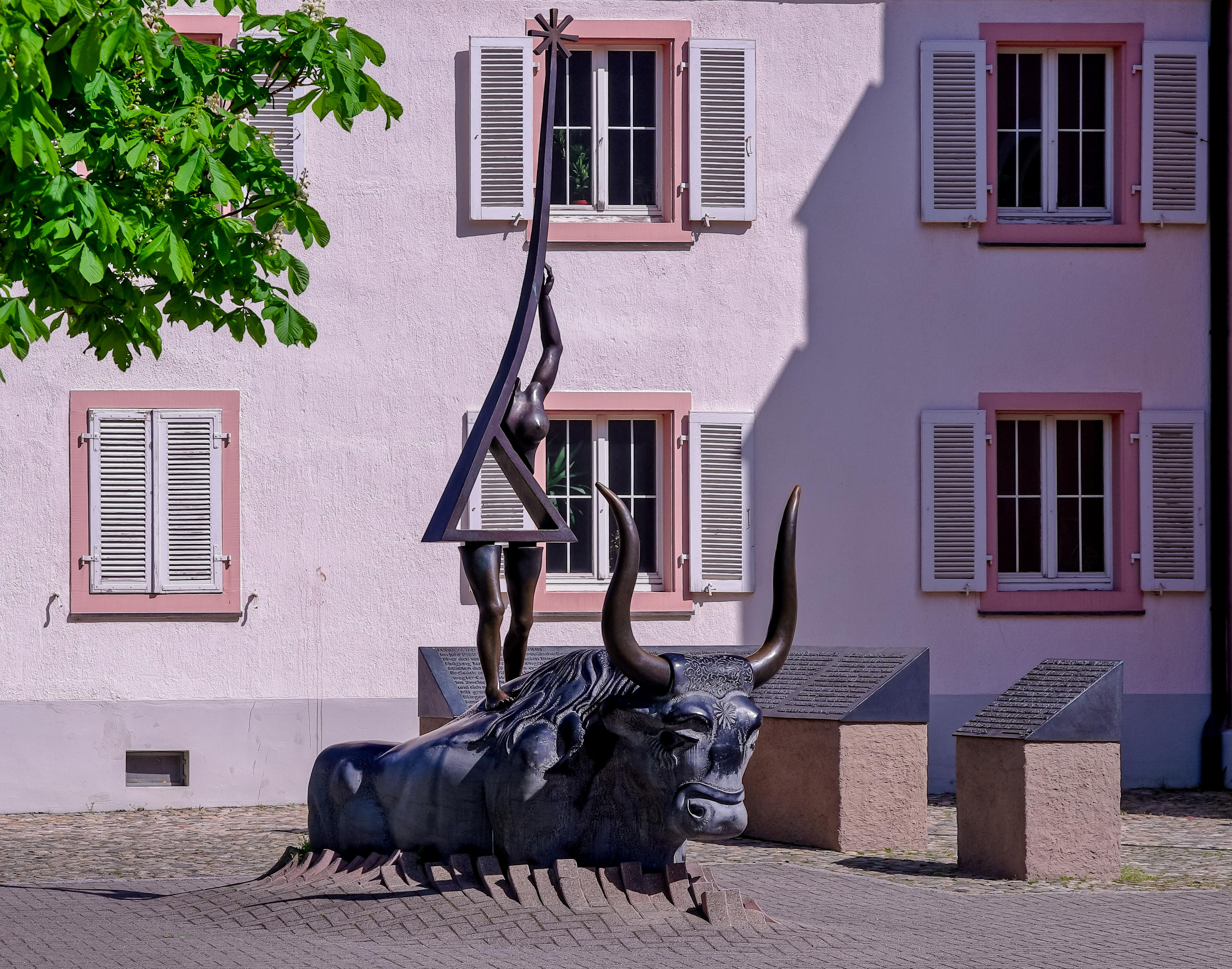 Bilder aus Breisach am Rhein: Europa greift nach dn Sternen, Helmut Lutz. Enthüllt am 09. Juli 2000, genau fünfzig Jahre nach dem Referendum, in dem sich Breisach zur Europastadt erklärt hat. Der Stier ist aus Marmor, die Europa aus Bronze.